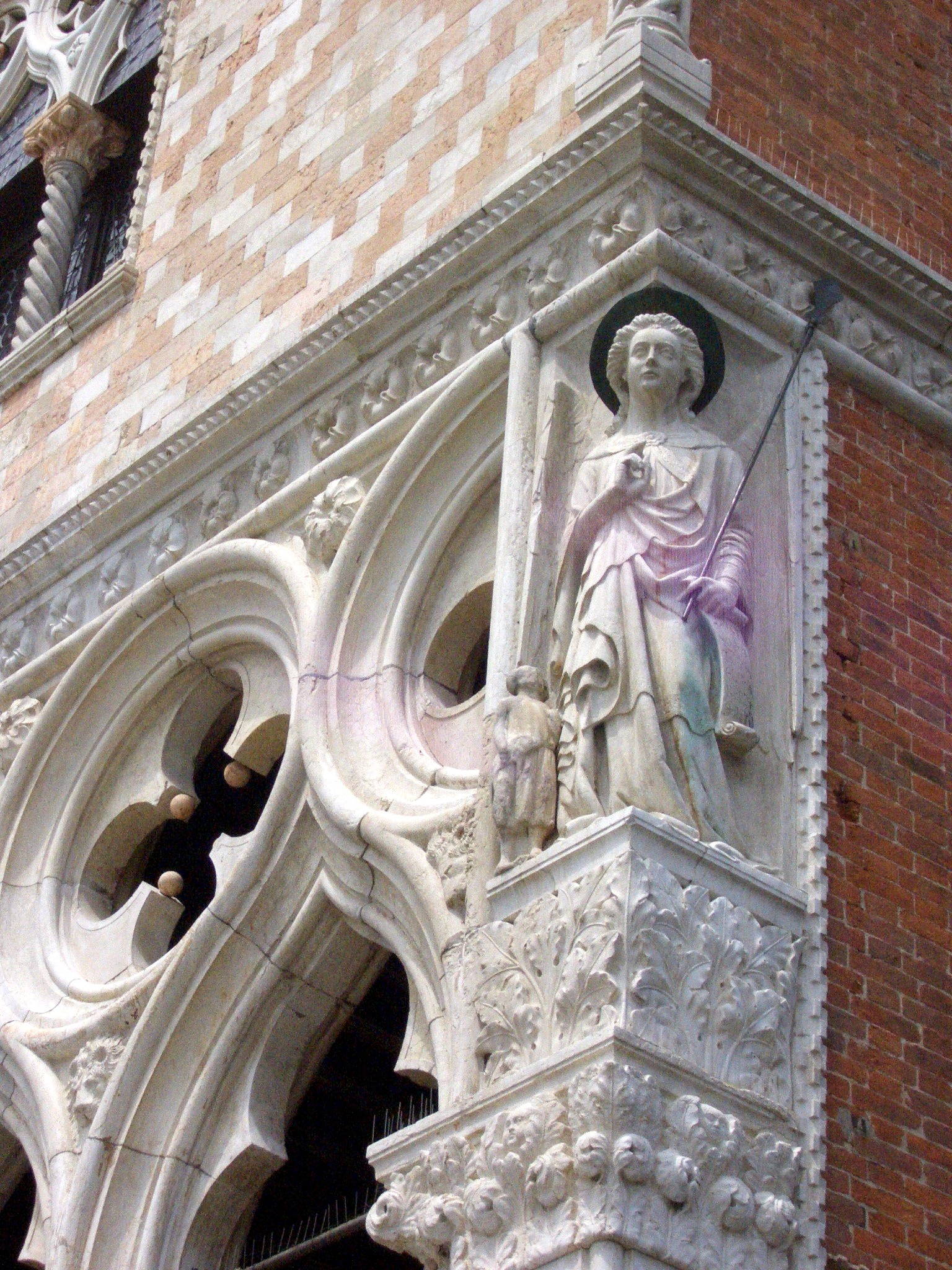 Particolare dell'angolo soprastante il rio. Foto scattata da me a Venezia il 1.7.05.